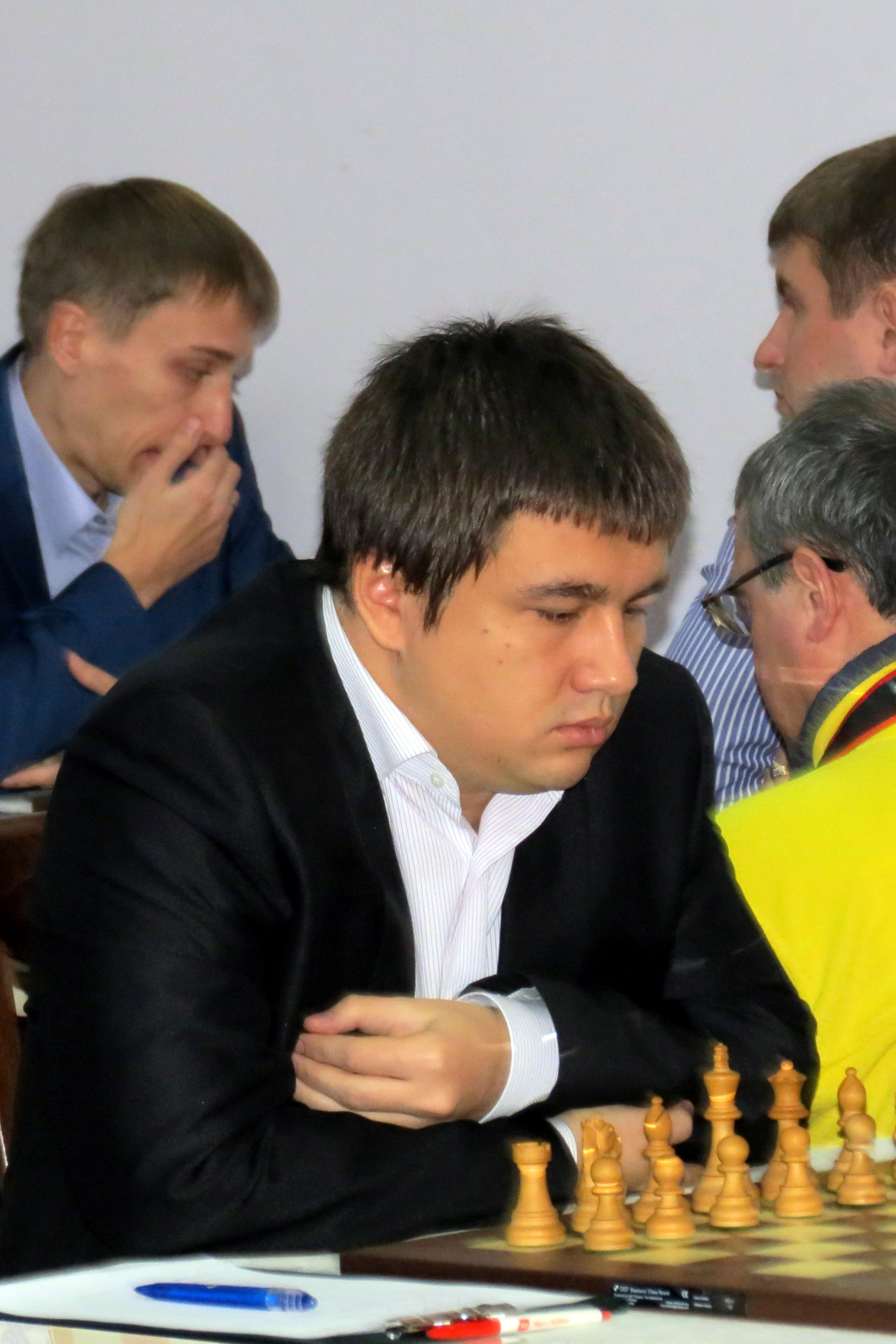 uk: Юрій Кузубов - чемпіонат України 2014р. (11 тур)